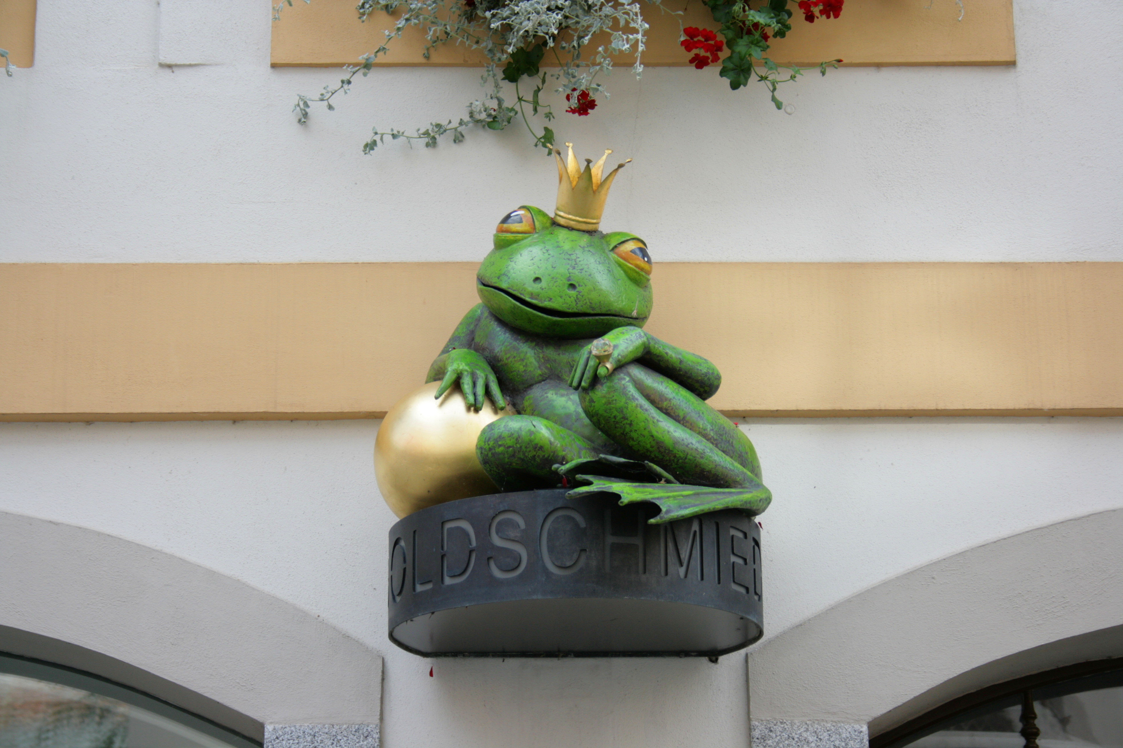 Heringstraße in Bautzen